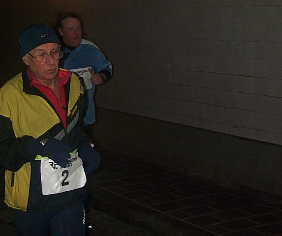 Werner Sonntag beim Elbtunnelmarathon 2004